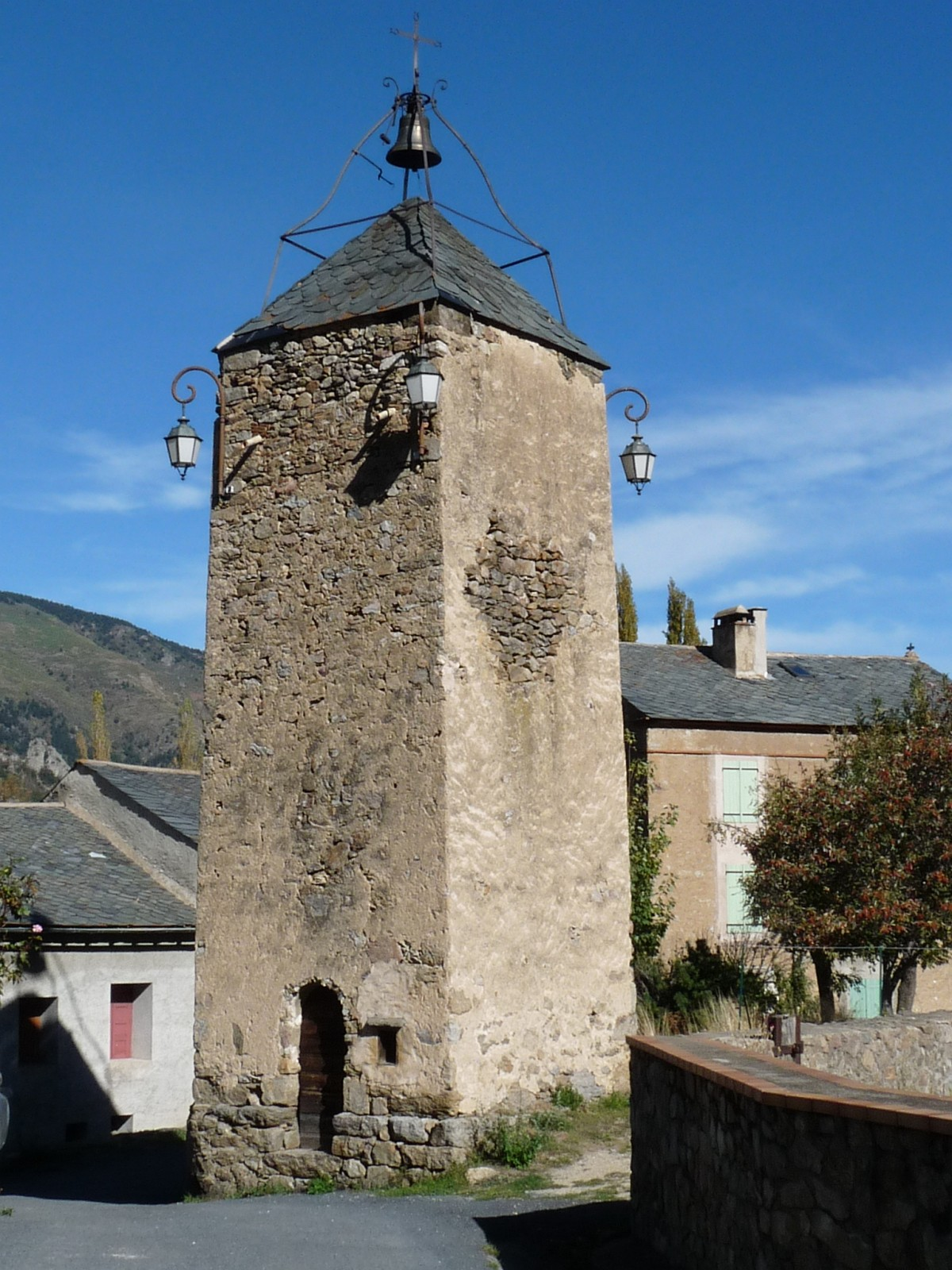 Tour-horloge, Prats-Balaguer, Pyrénées-Orientales, France